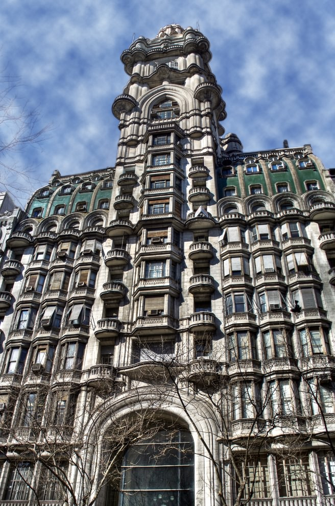 Palacio Barolo, Avenida de Mayo 1370, Buenos Aires, Argentina.